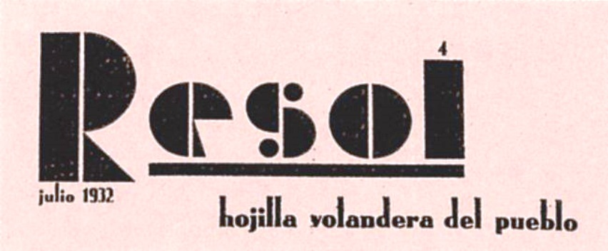 Revista Resol.